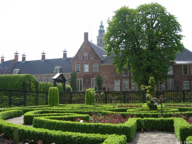 Foto door Fruggo, april 2004, vrijgegeven onder GNU-FDL